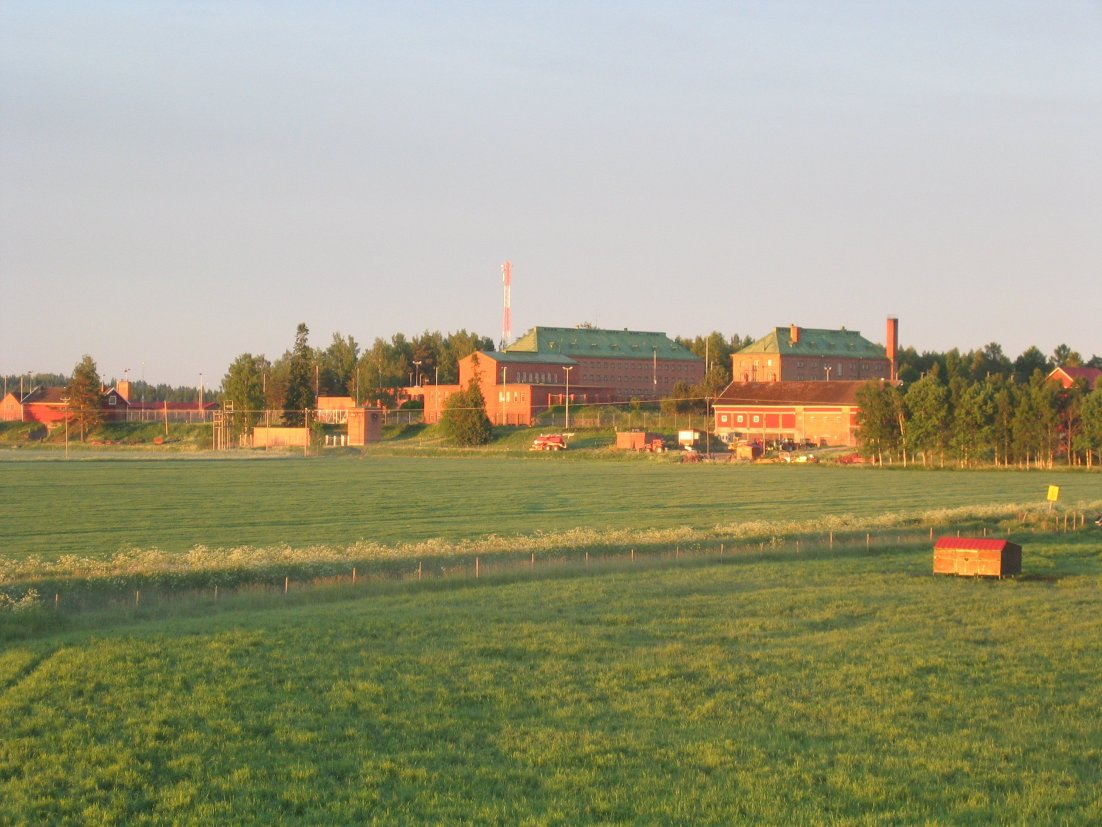 Konnunsuo Joutsenossa.